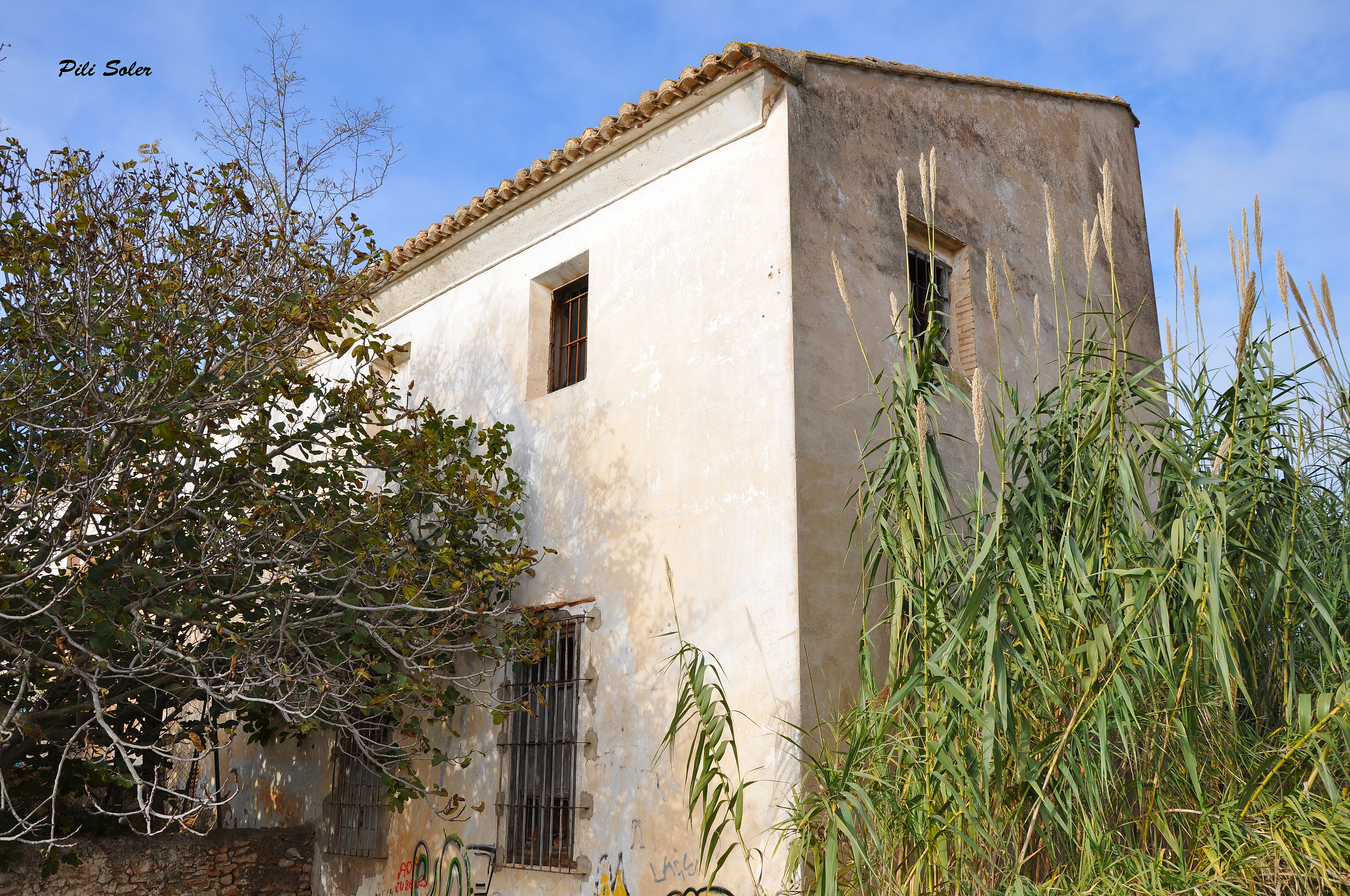 Molí de l'Eliana